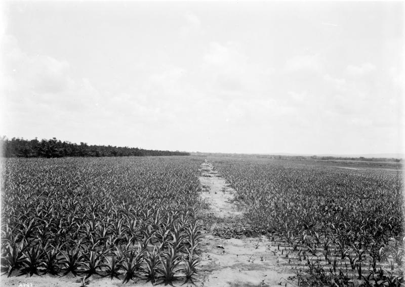 Feld mit Sisalpflanzlingen